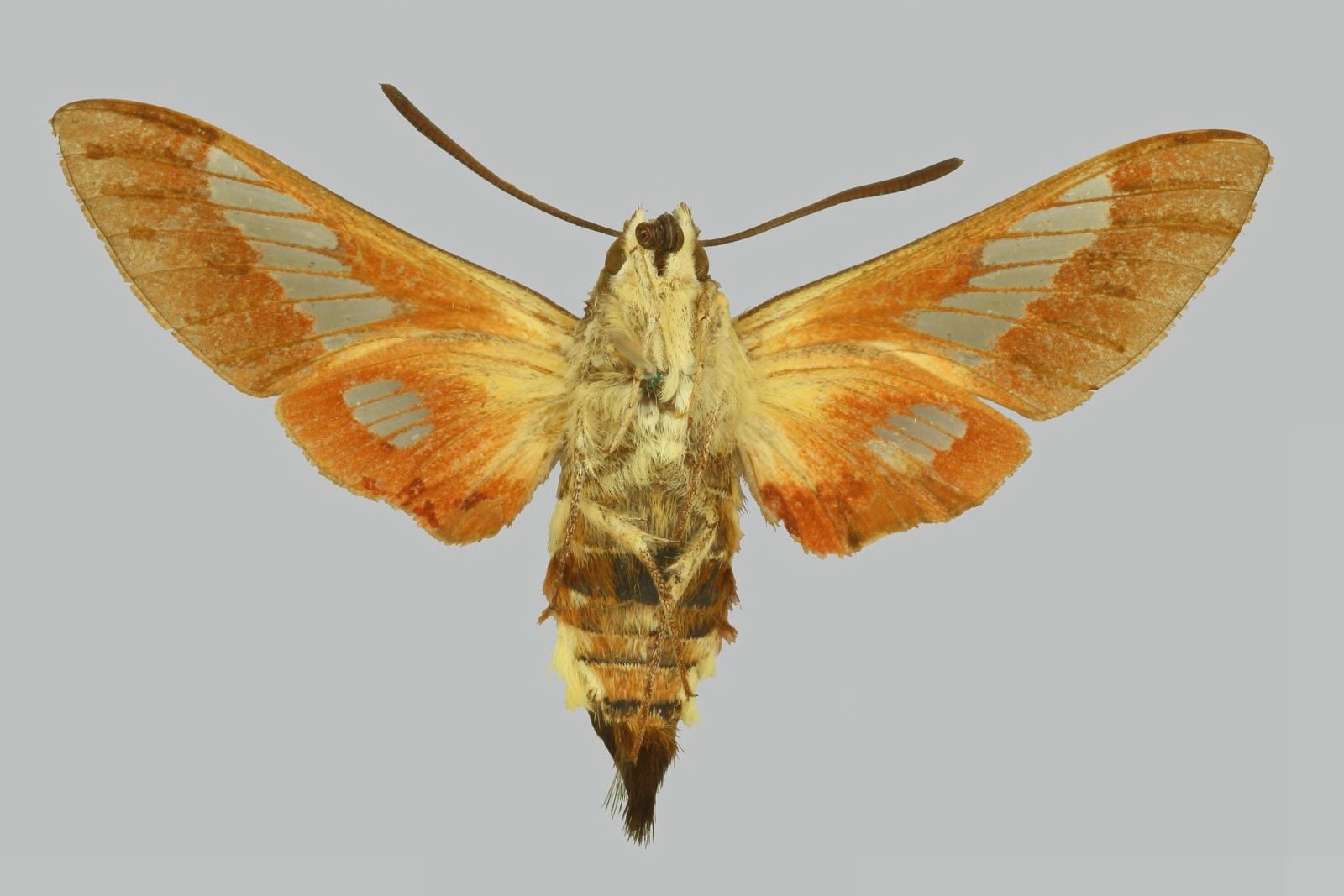 Hemaris ducalis Female underside from Tajikistan, Garm